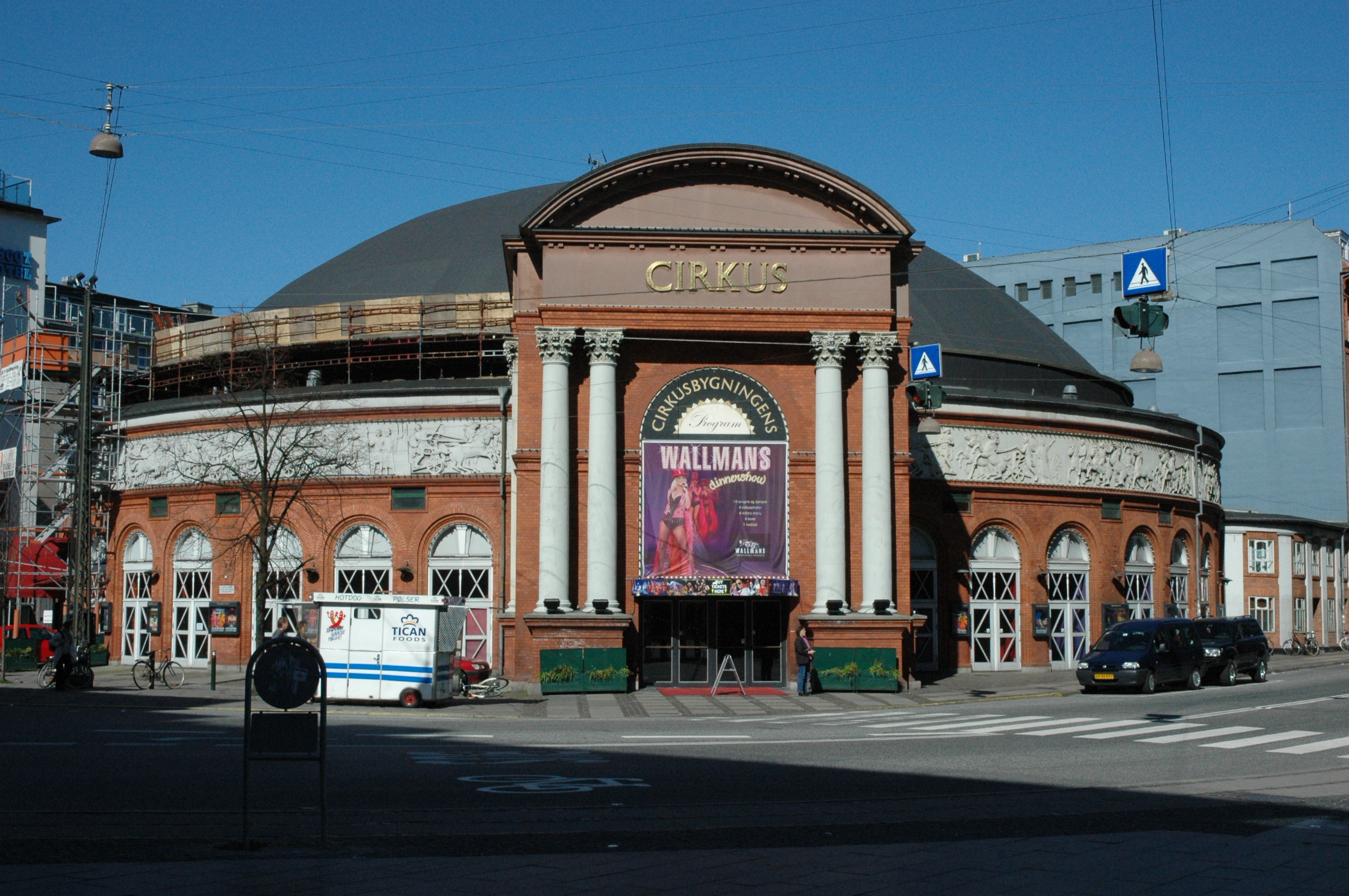 Cirkus Bygningen, Copenhagen